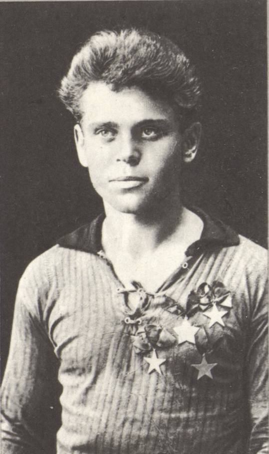 Иван Георгиевич Старчак - победитель спартакиады Бурят-Монголии 1926 г.